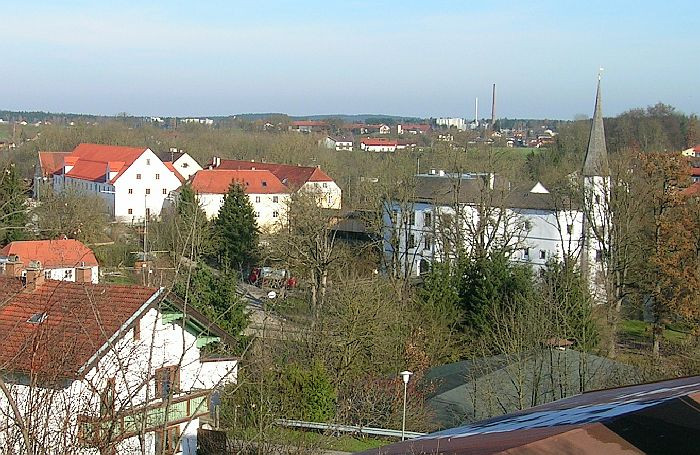 Blick auf Pertenstein mit der Stadt Traunreut im Hintergrund Lou.gruber (98755 Byte) (Eigene Photographie. Januar 2005.